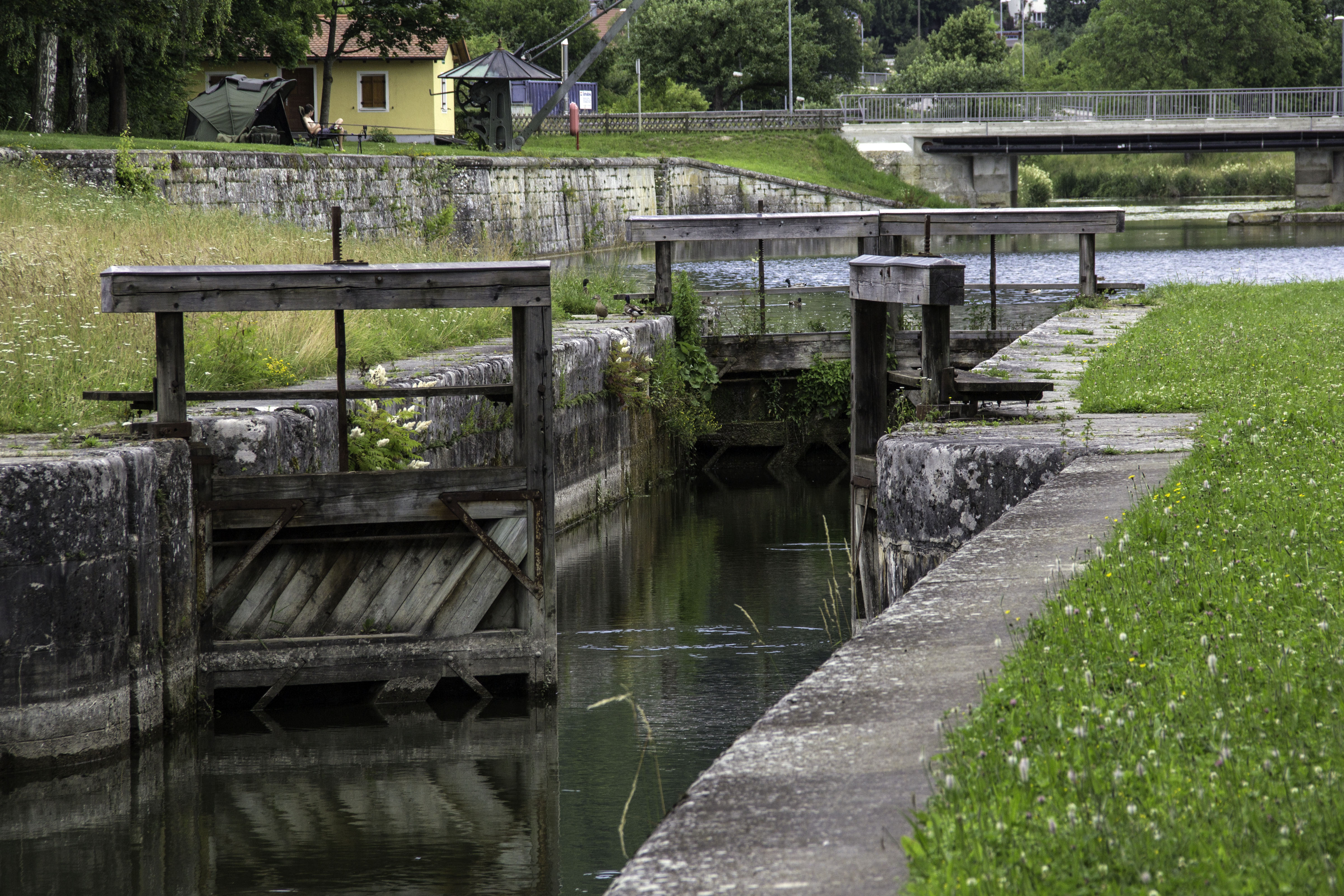 Schleuse 1, Kelheim